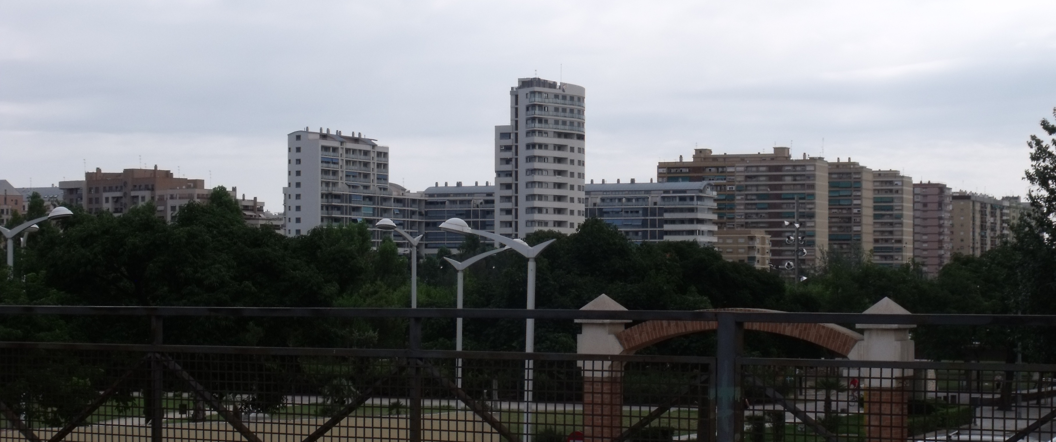 Jardín del Turia y sudoeste del Distrito de Campanar.